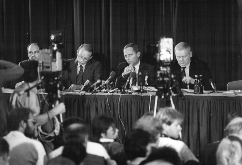 ADN-ZB Oberst-8.9.87-kb-BRD: Honecker-Besuch Der Leiter des Bundeskanzleramtes, Bundesminister Wolfgang Schäuble (M.), nahm auf einer Pressekonferenz in Bonn zu Verlauf und Ergebnissen der offiziellen Gespräche zwischen Erich Honecker und Helmut Kohl Stellung. Rechts: Staatssekretär Friedhelm Ost, Chef des Presse- und Informationsamtes der Bundesregierung, 3.v.r.: Hans-Otto Bräutigam, Leiter der Ständigen Vertretung der BRD in der DDR.